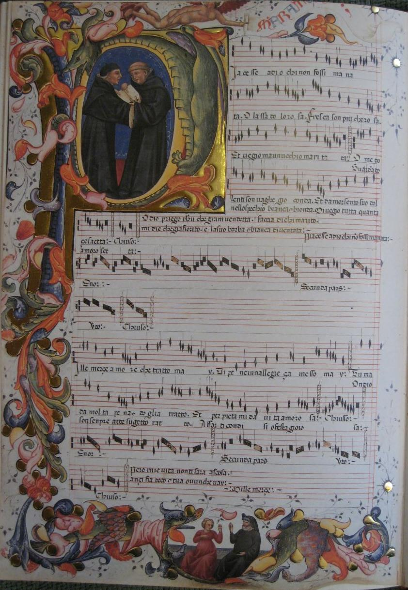 Piacesse a Dio ch'i' non fossi ma' nata, Codex Squarcialupi